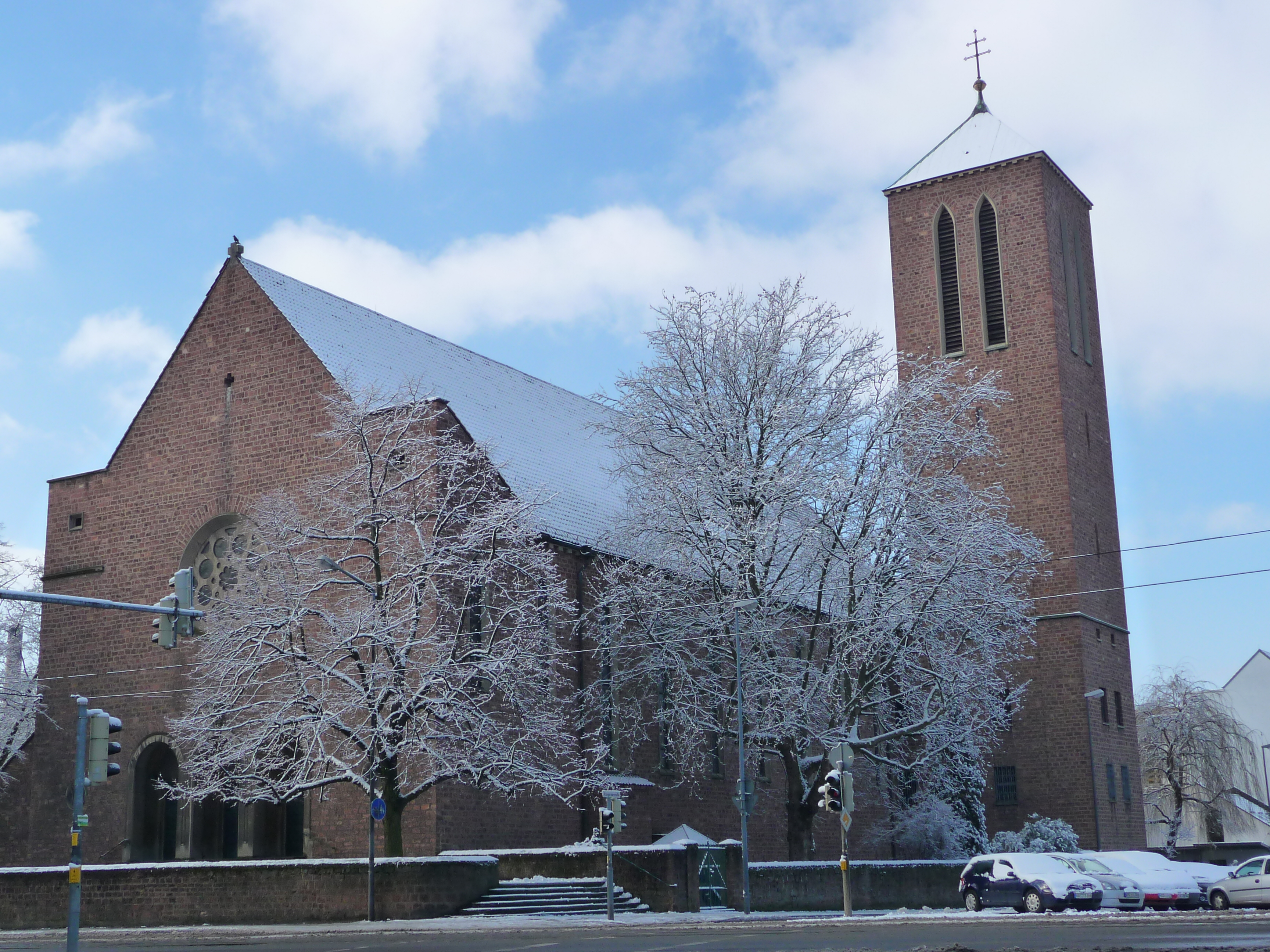 Katholische Kirche St. Albert in Heidelberg-Bergheim (Deutschland)